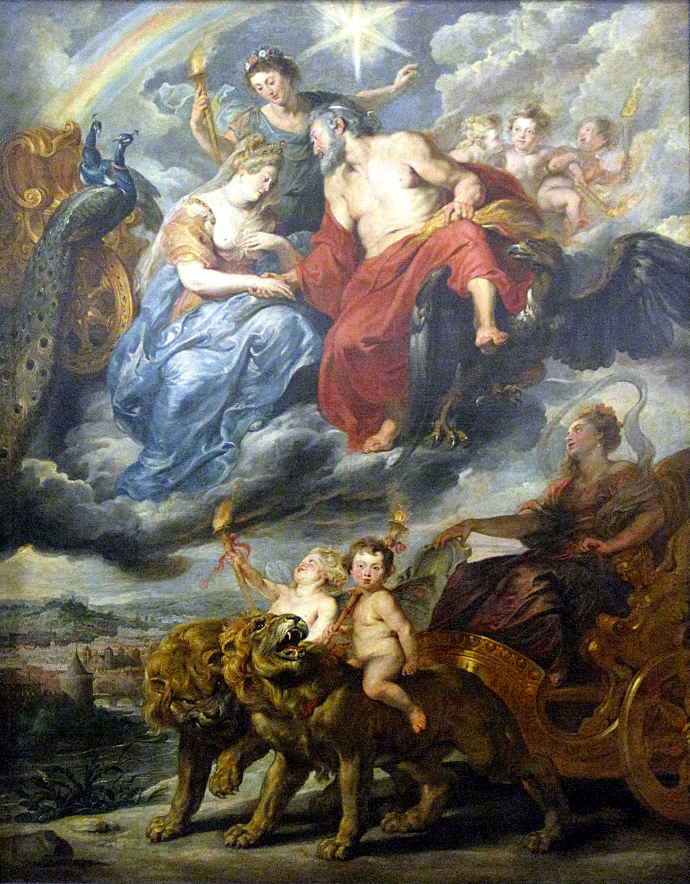 Peinture fiamande au Louvre, Paris